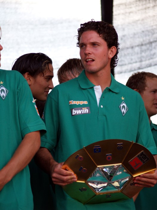 Leon Andreasen beim Tag der Fans